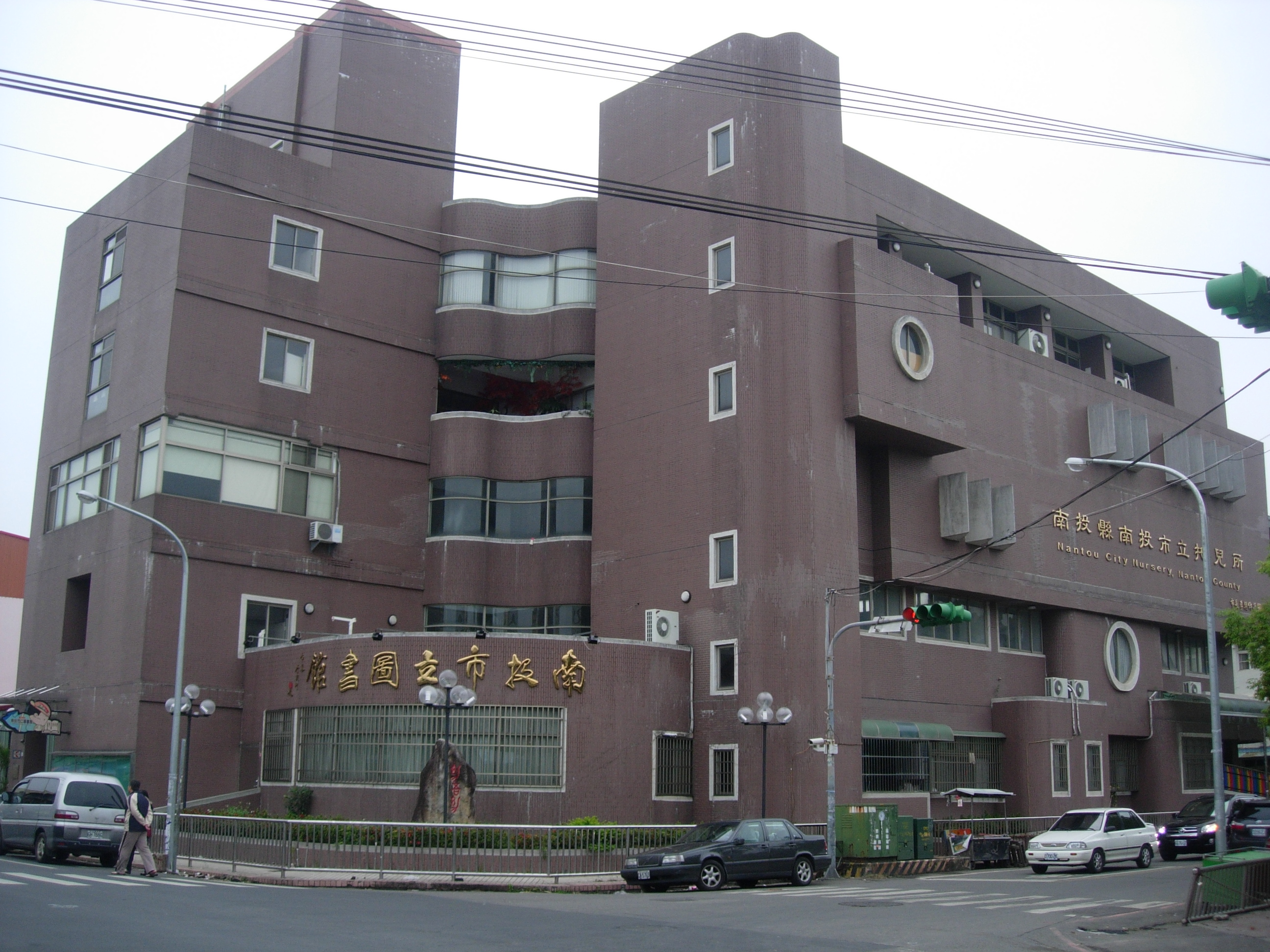 中文（台灣）: 南投市立圖書館。